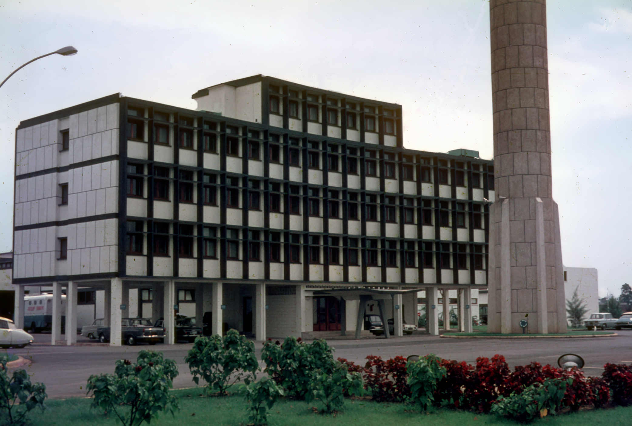 Siége et studios de la RDI à Cocody Radio Télévision Ivoirienne